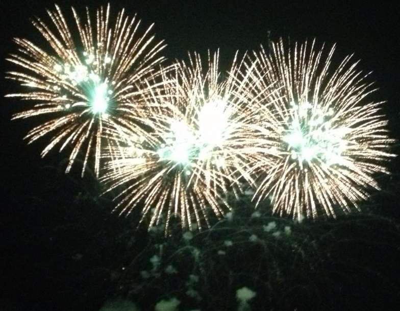 Fuochi San Rocco 2013 Palmi